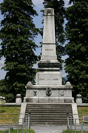 Schlachtdenkmal in Näfels (1388)